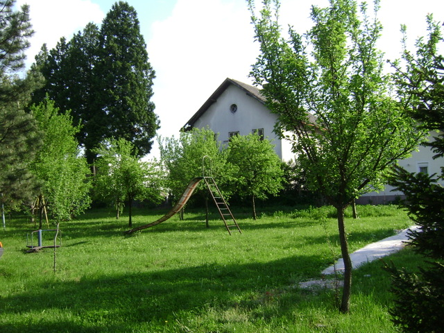 Kolodvorska zgrada u Samoboru